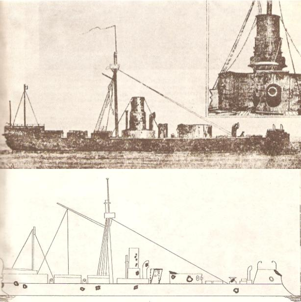 Daños e impactos recibidos por el Huascar el 8 de octubre de 1879